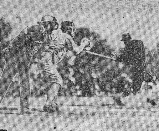 1922년 전국체육대회 야구(제3회 전조선야구대회) 대회 2일차, 배재구락부와 연희전문학교의 경기 모습